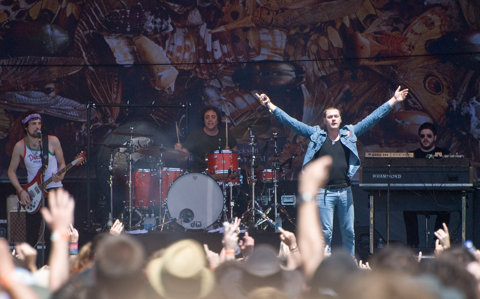 Kasabian performing at Big Day Out 2010